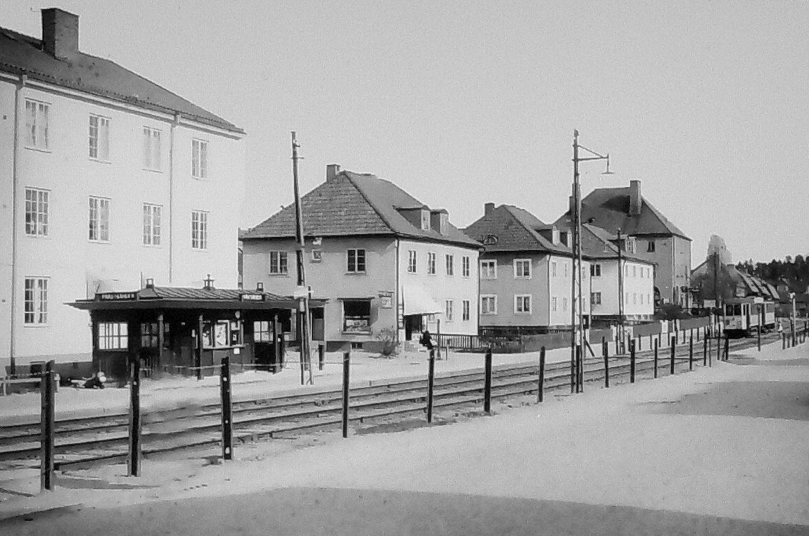 Ulvsundavägen 1931. En spårvagn närmar sig hållplatsen "Prästgården". Väntpaviljongen ritad av arkitekt Waldemar Johansson (1883-1955).